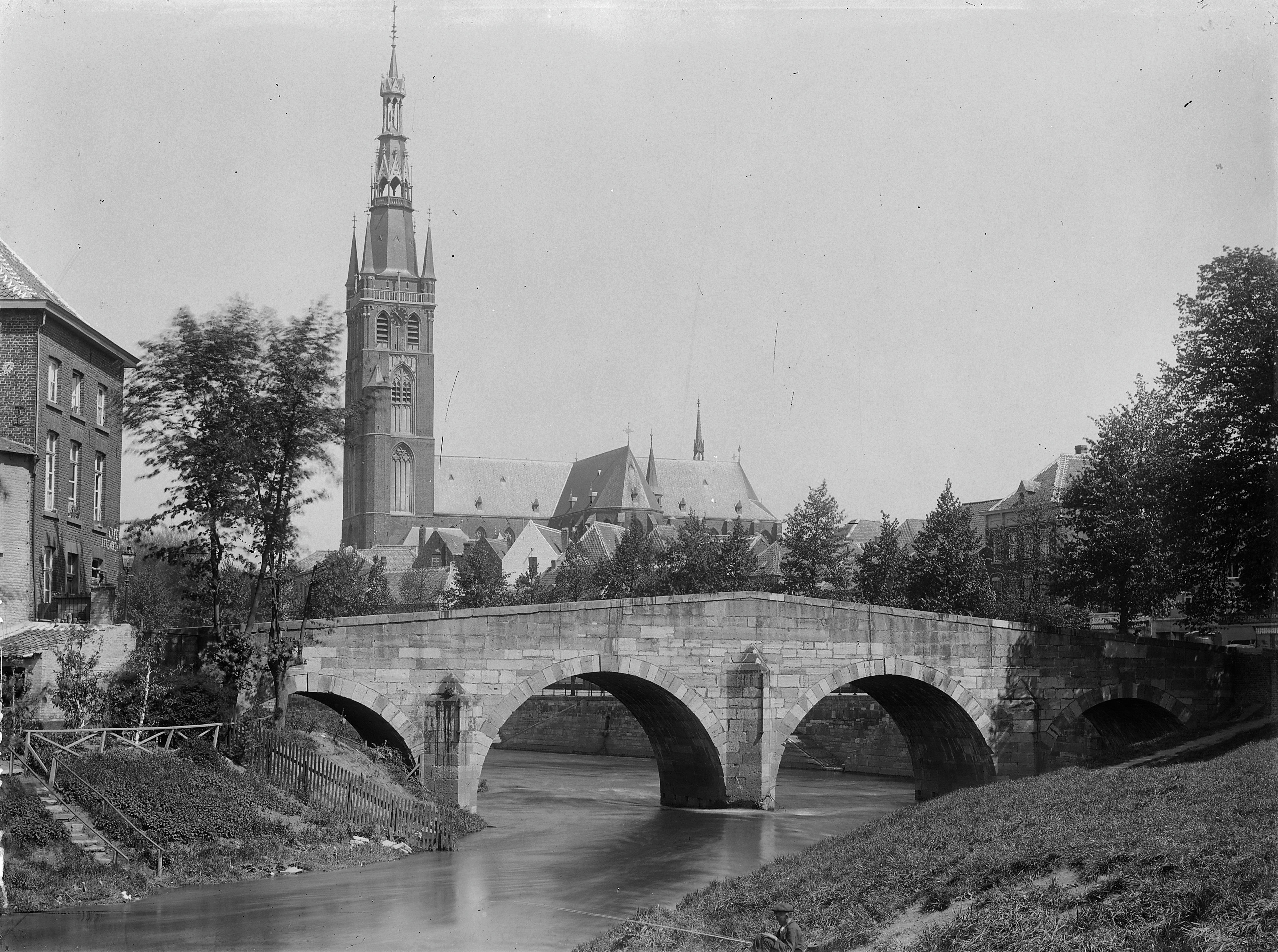 Stenen Brug: Overzicht oude stenen brug over de Roer